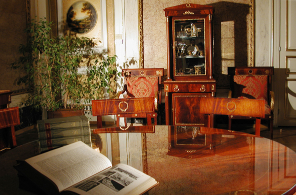 .Grand Hotel Kraków.